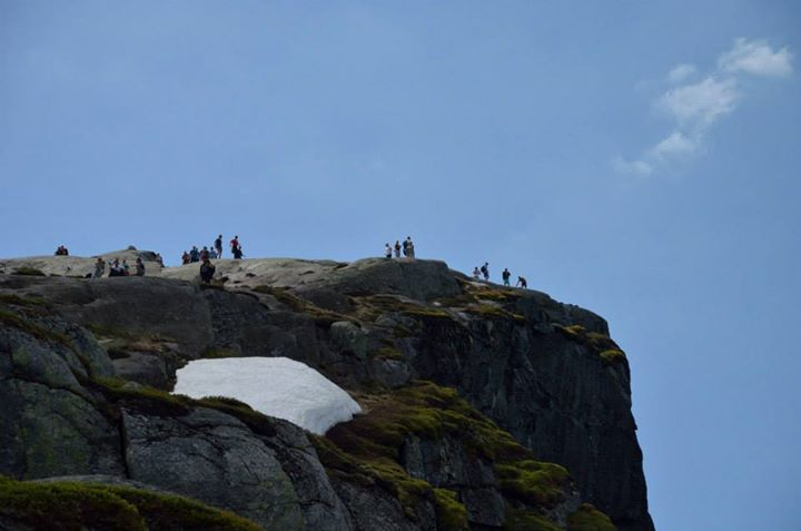 Nesatindane